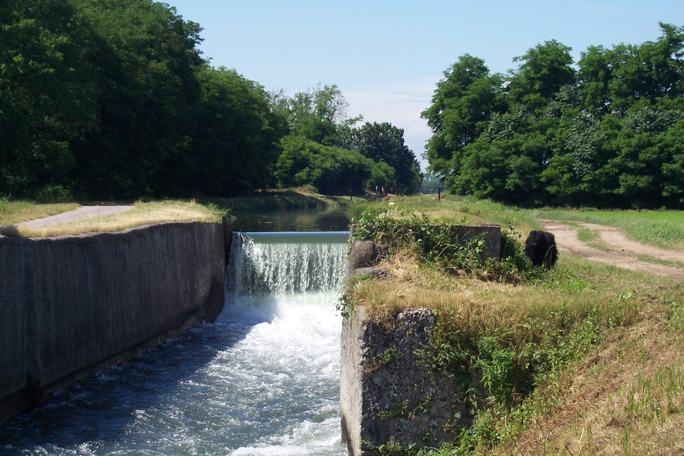 L'impianto di una vecchia conca sul Canale di Bereguardo